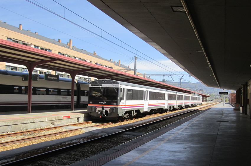 Un automotor eléctrico de la serie 470 de Renfe Operadora espera, estacionado en la estación de Ponferrada (El Bierzo, Provincia de León, Castilla y León), para realizar el servicio Regional a León.